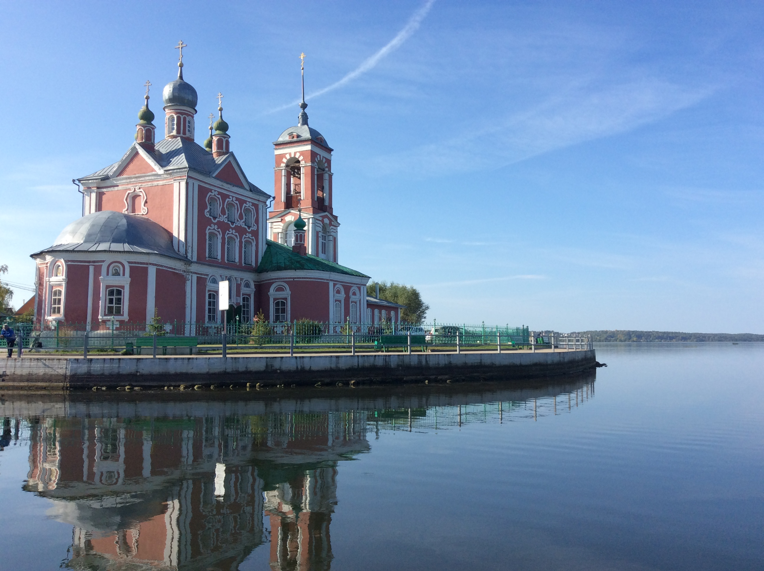 Церковь Сорокасвятская (Сорока мучеников): улица Левая набережная, 165, Переславль-Залесский, Ярославская область